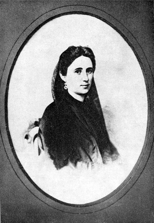 Бубнова Екатерина Степановна, жена писателя Н. С. Лескова